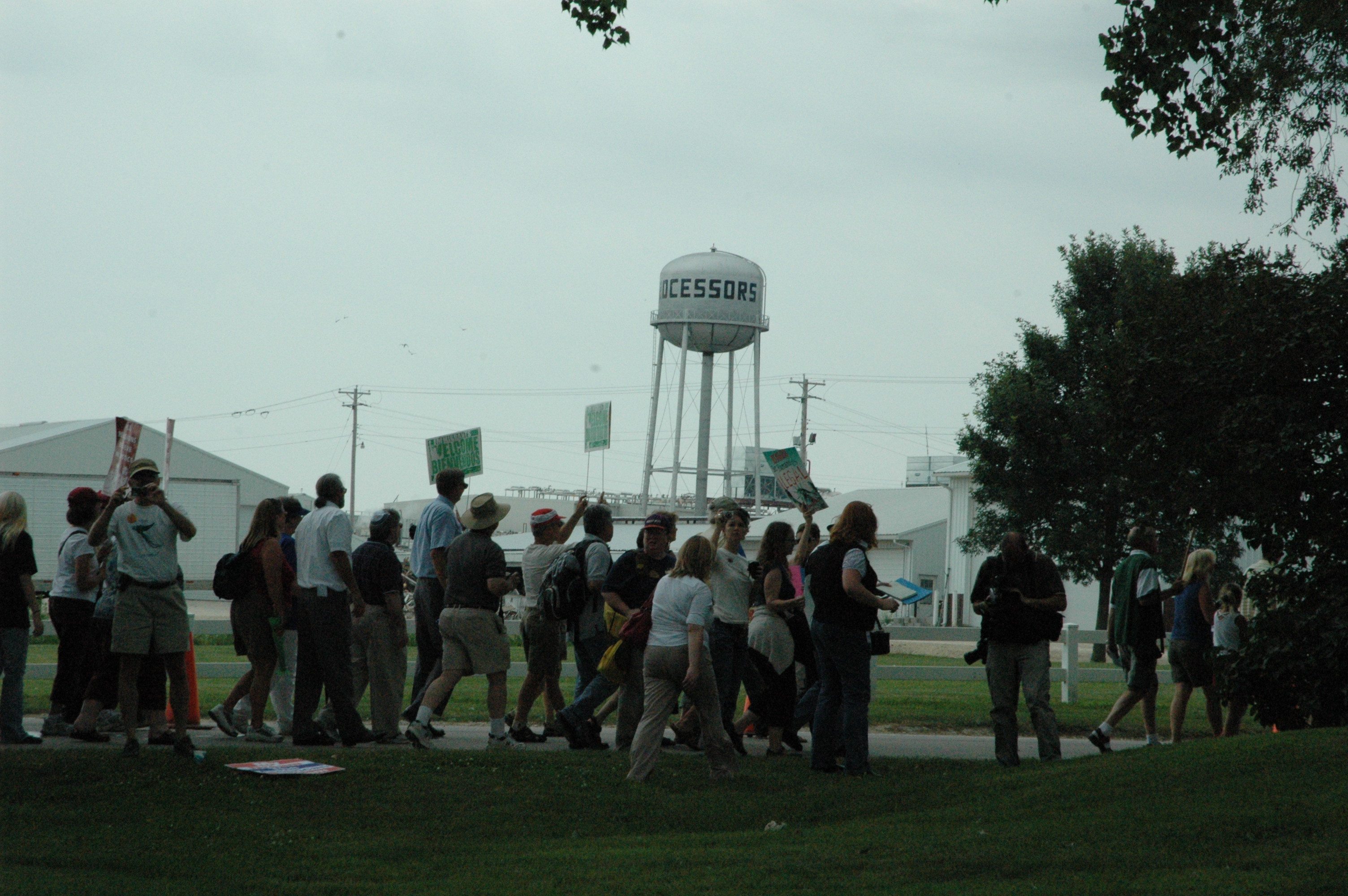 Protest outside Agriprocessors plant, Postville, Iowa.